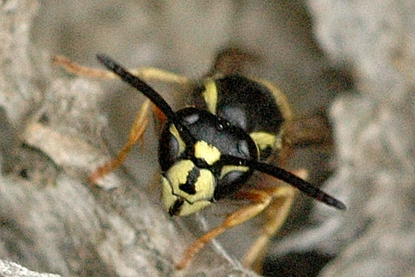 Vespula rufa from Commanster, Belgian High Ardennes .